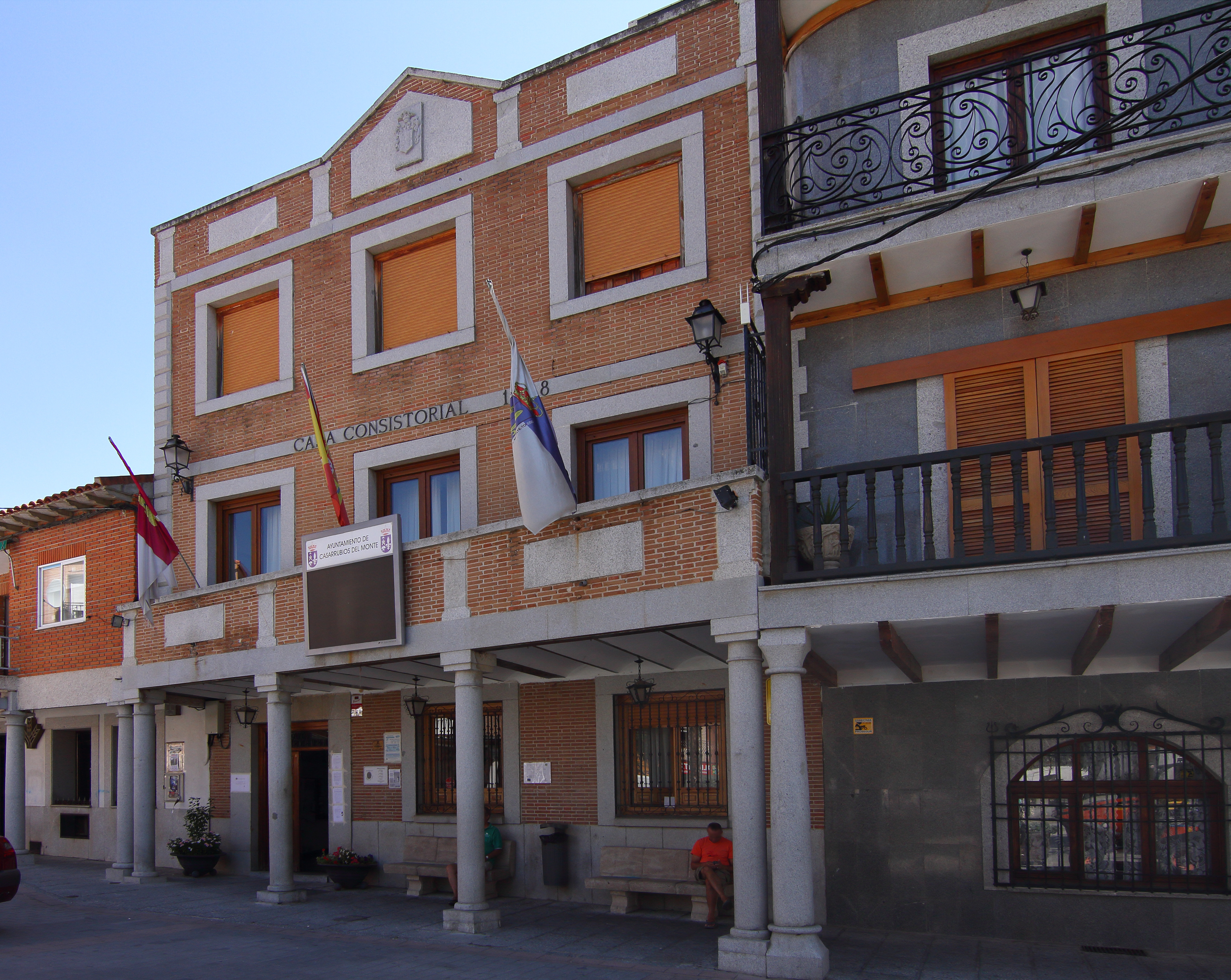 Casarrubios del Monte, Ayuntamiento